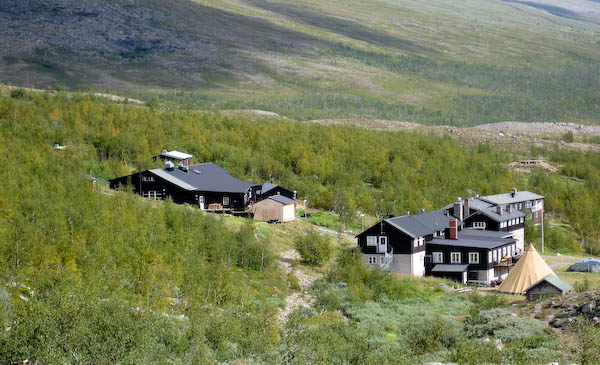 Kebnekaise Fjällstation, Schweden